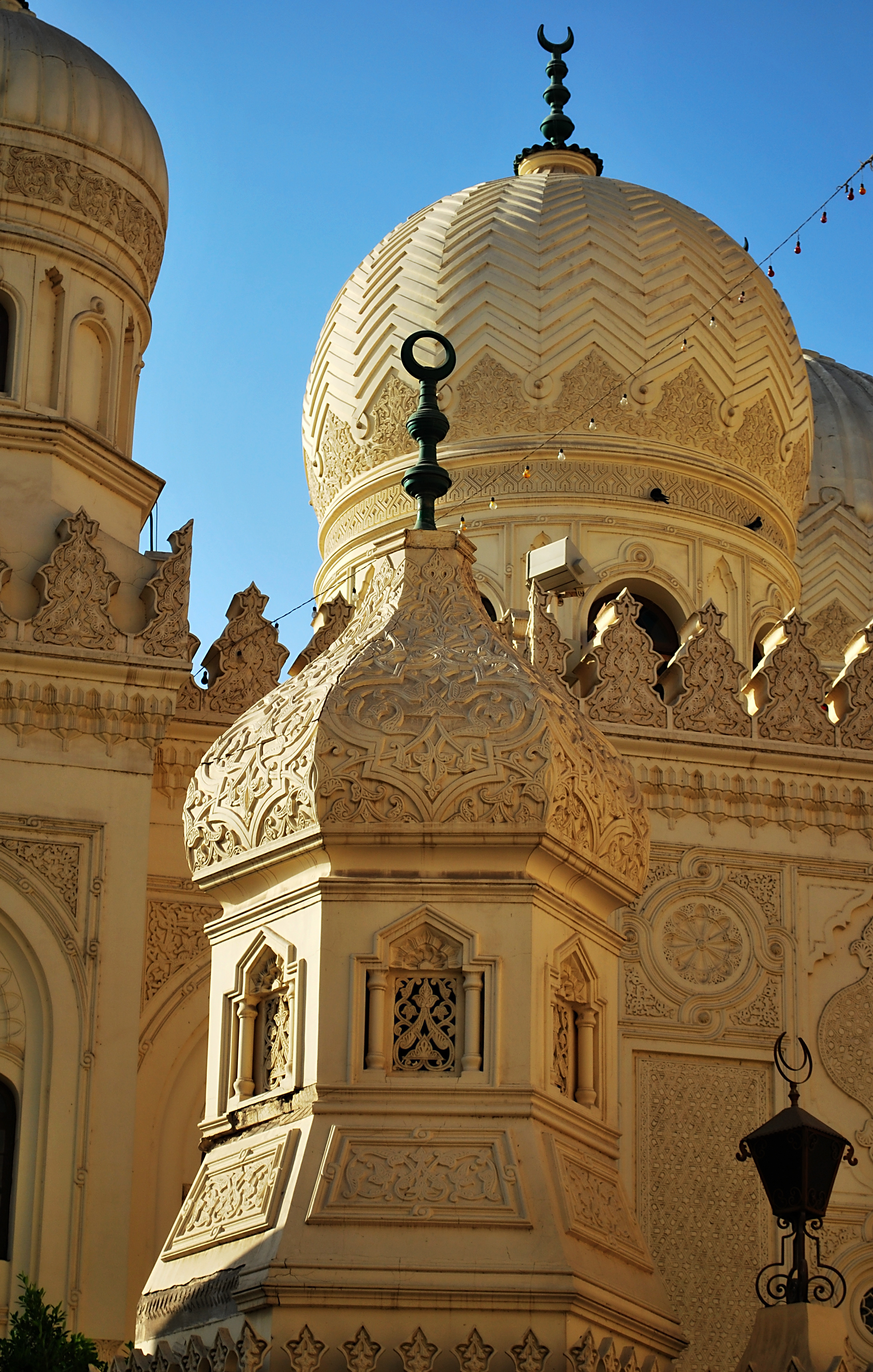 مسجد الحبشي بمدينة دمنهور، مصر